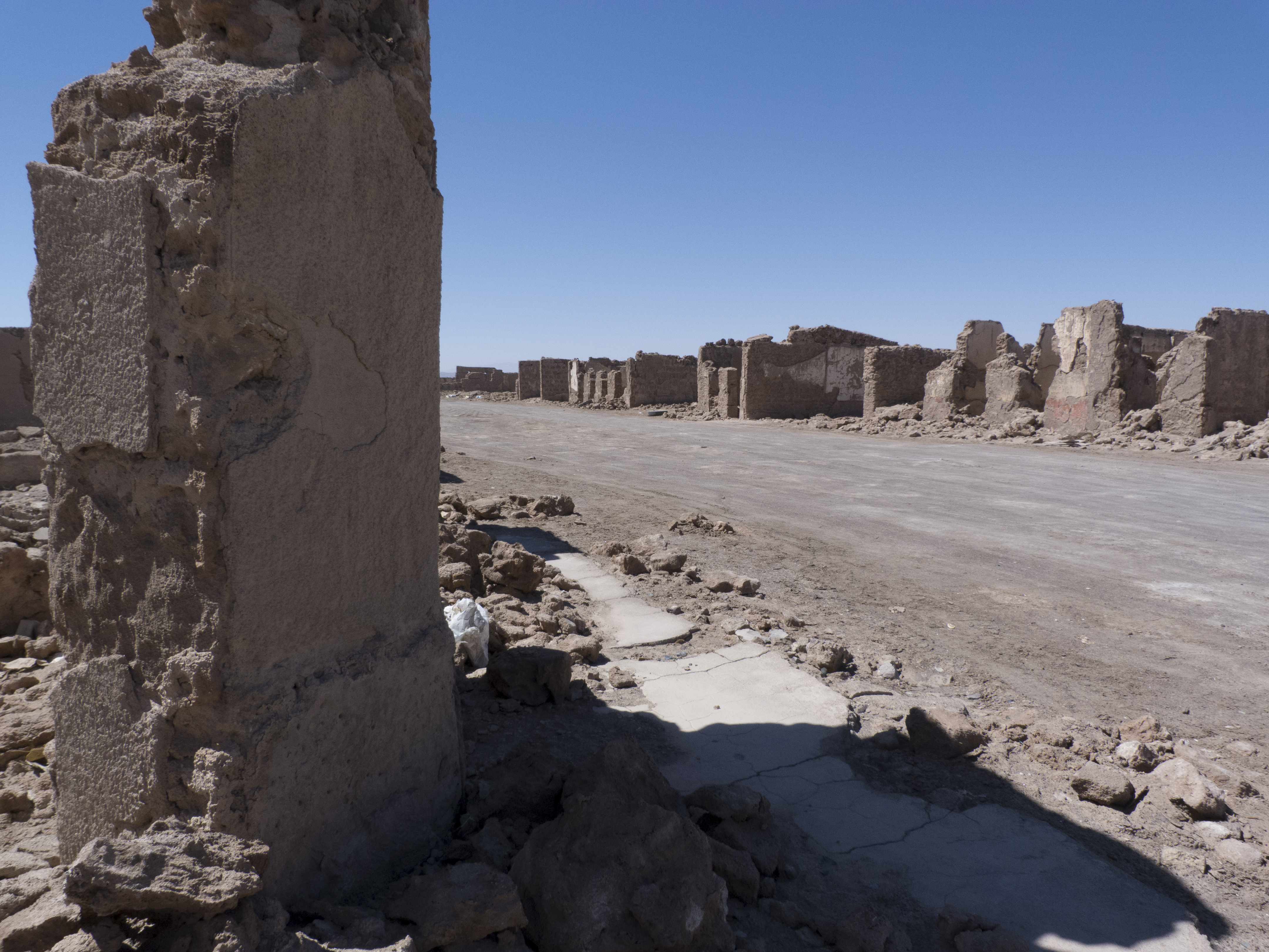 Calles de las ruinas del pueblo abandonado This is a photo of a national monument in Chile: 543